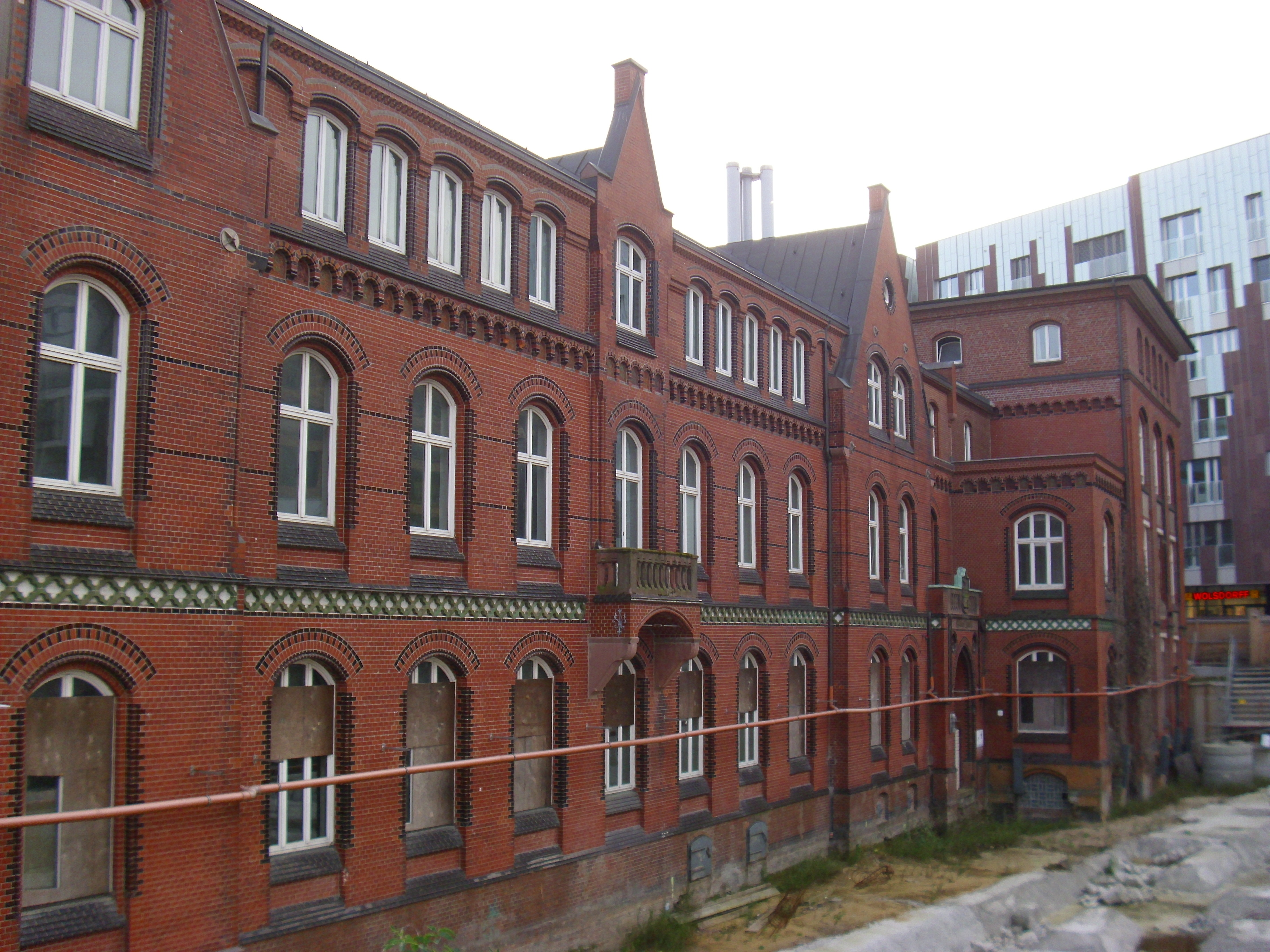 Ehemaliges Gebäude des Amtes für Strom- und Hafenbau an der ehemaligen Dalmannstraße. This is a photograph of an architectural monument.